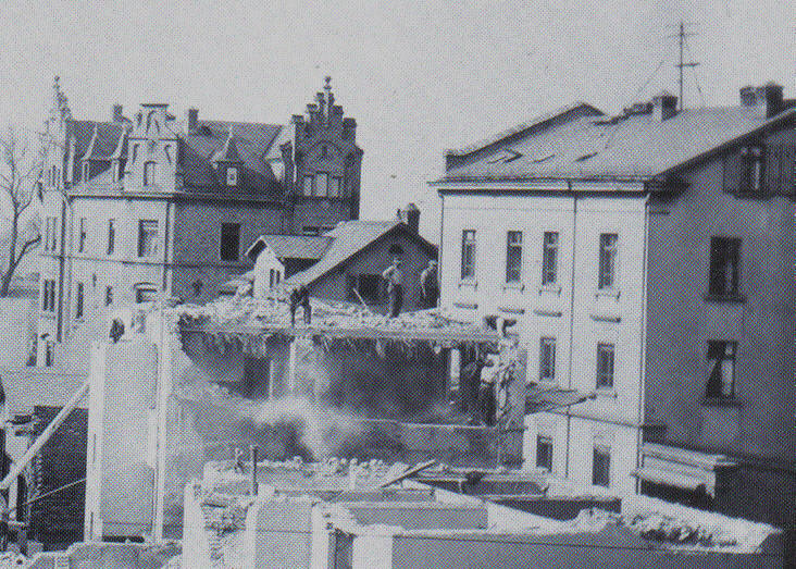 Frankfurt-Bockenheim. Foto von 1914 der Abrissarbeiten in der Häusergasse für den Bau der Breitenbachbrücke über die Gleise der Main-Weser-Bahn. Die Bauarbeiten der Breitenbach-Brücke (benannt nach dem Preußischen Minister für öffentliche Arbeiten, Paul von Breitenbach, 1850–1930) dauerten von 1914/16. Dieser Baumaßnahme fiel auch der Park des Schönhofes zum Opfer. Das linke im Hintergrund abgelichtete Haus in der Häusergasse Ecke Fritzlarer Straße wurde im Zweiten Weltkrieg teilweise zerstört und wieder aufgebaut, insbesonders wurde das Dachgeschoss in stark vereinfachter Form erneuert. Die beiden Erker der Hausfassade haben sich ebenso erhalten wie die Zieranker. Bei der linken im Vordergrund im Abriss befindlichen Liegenschaft handelt es sich um den HANAUER HOF Kelterei J.Stein in der Häusergasse nebst Nebengebäude, wie Kegelbahn, Gartenwirtschaftsbbereich etc. Der Erbauer des HANAUER HOFES war Daniel Ludwig, der bis 1830 die nahegelegene Wirtschaft ZUM SCHWAN am Kirchplatz 5 führte, Bockenheimer Bürger war das Gebäude am Kirchplatz 5 als Storchennesthaus bekannt, wählten doch langezeit Storchenpaare den Schornstein des Gebäudes als Nistplatz erwählten, wohl auch wegen der nahen feuchten Niddawiesen.